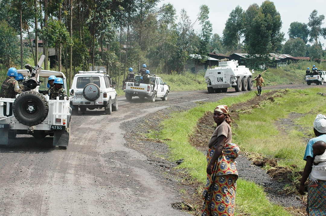 Elements of MONUSCO Force Intervention Brigade patrol on the main road connecting the towns of Sake and Kibati in the northwest of Goma, North Kivu province, during the clashes that opposed the M23 rebel group to the National Defense Forces (FARDC) at the end of October 2013. Photo: MONUSCO/Clara Padovan Des éléments de la Brigade d’Intervention de la MONUSCO en patrouille sur la voie principale menant de Sake à Kibati, deux villes situées au Nord-Ouest de Goma dans la province du Nord Kivu. Ces mouvements de patrouille s’étaient effectués lors des combats ayant opposé le groupe rebelle M23 aux Forces Armées congolaises (FARDC) vers la fin du mois d’octobre 2013. Photo : MONUSCO/Clara Padovan